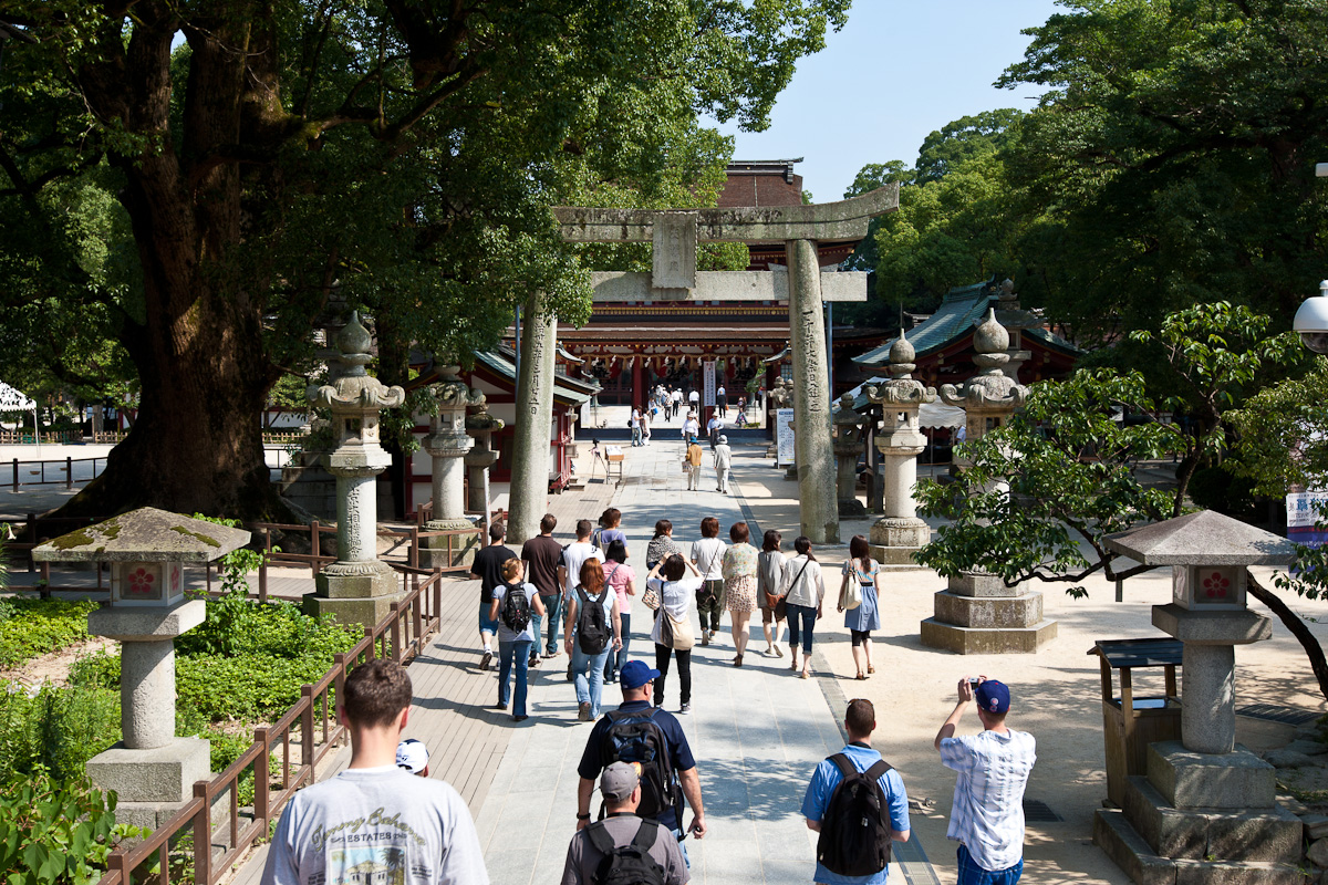 Nagasaki